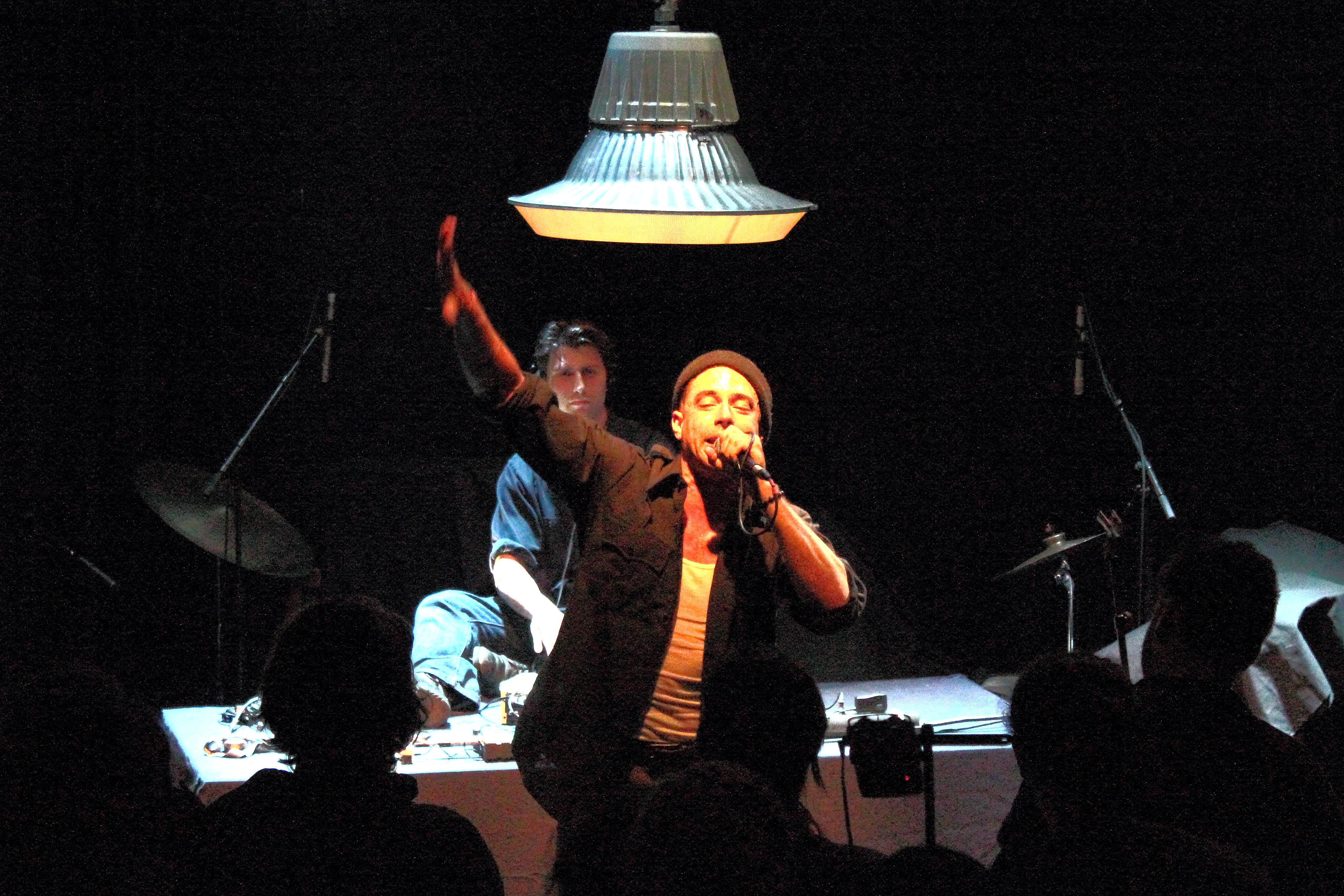 Concert de Kill The Vultures pour le festival Bruisme #3 au Confort Moderne - Poitiers, juin 2013. Flickr Tags: Confort Moderne Poitiers Festival Bruisme Musique Music Expérimental Scène Stage Live Concert Extrême Jazz à Poitiers Kill the vultures' Rap Hip Hop Crescent Moon France. from Flickr album "Le Confort Moderne" by Xi WEG from Poitiers, France